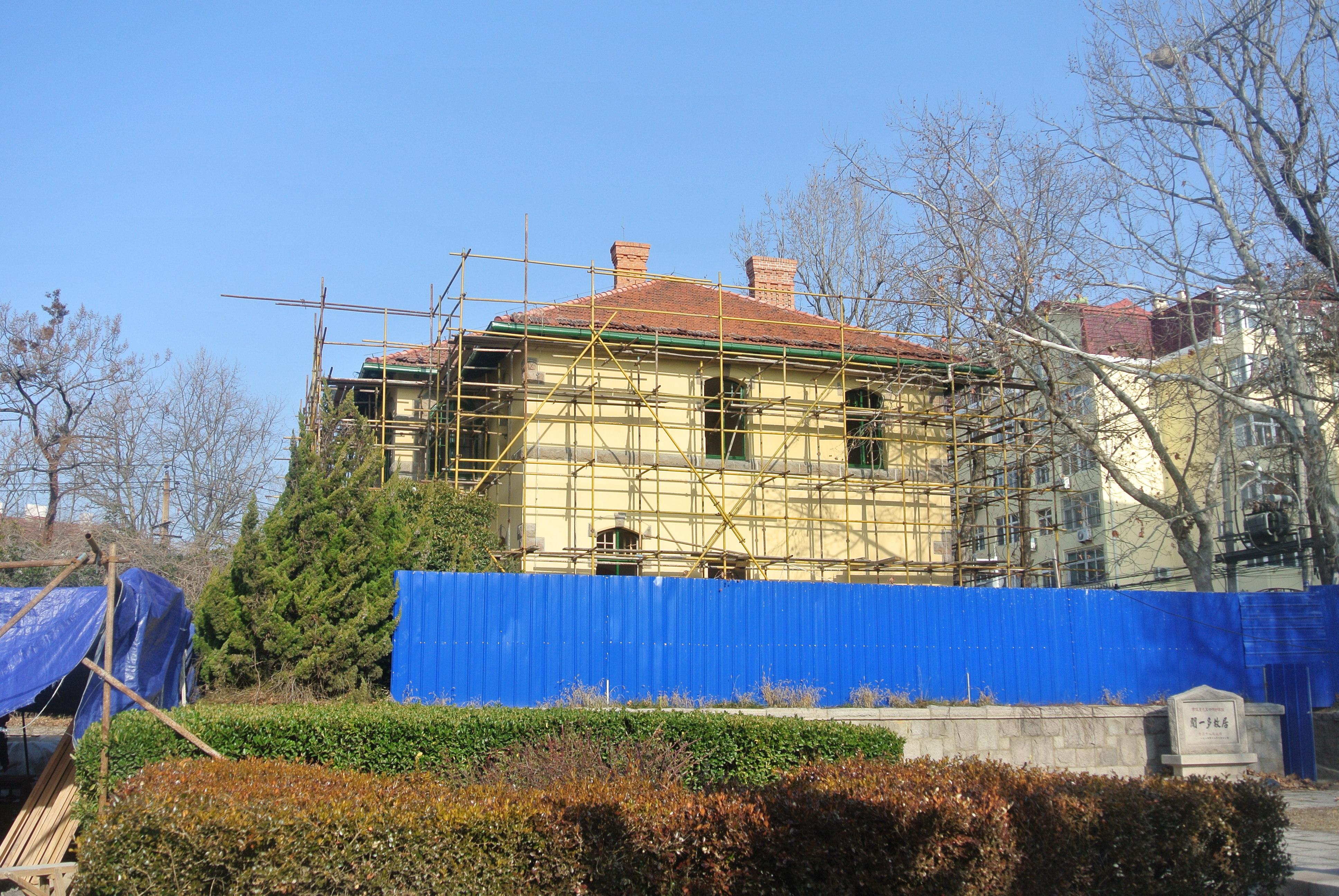 青岛闻一多故居